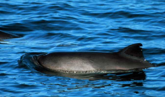 Schweinswal